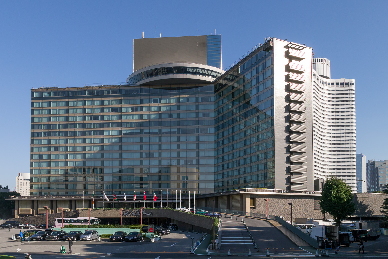 ホテルニューオータニ・ザ・メイン、東京都千代田区紀尾井町。